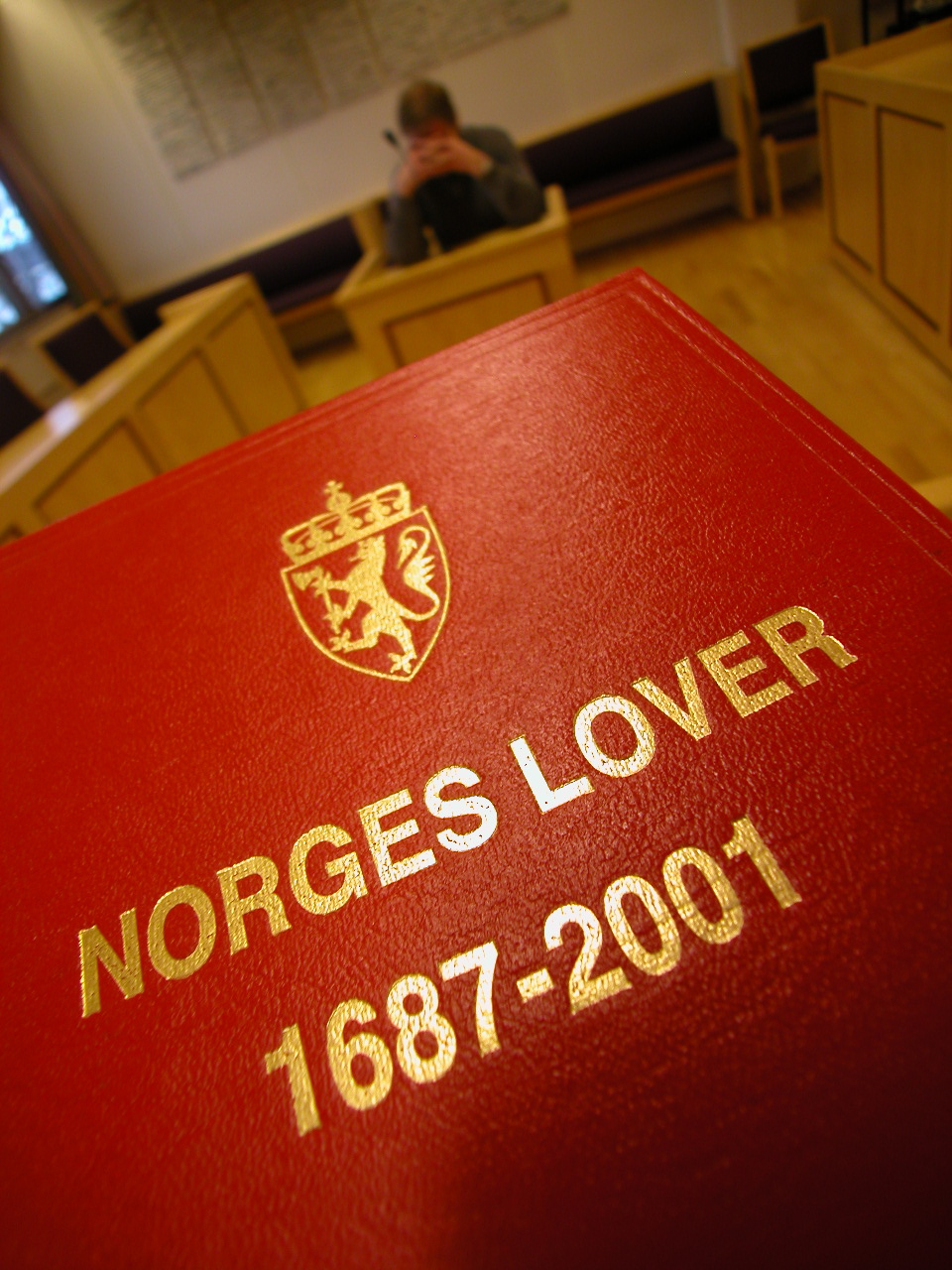 Norges lover